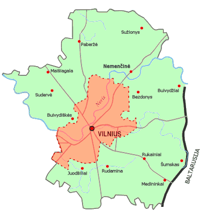 Vilniaus Rajonas